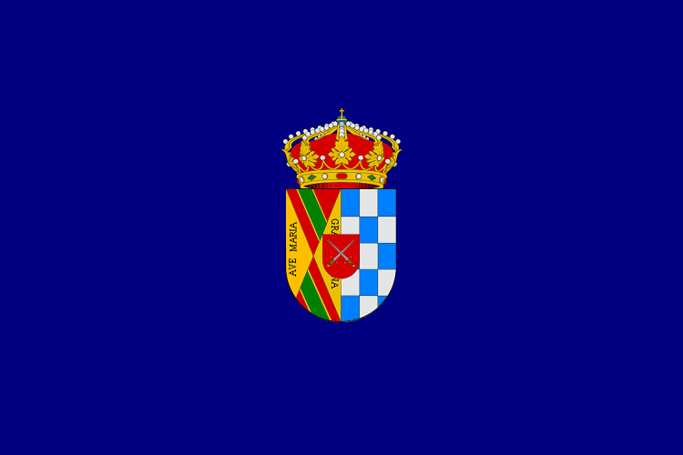 Bandera de Griñón (Madrid)